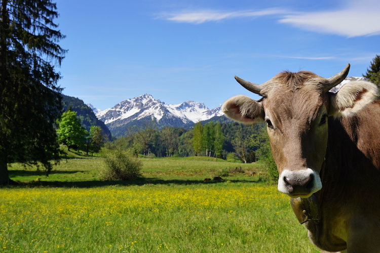 Primo piano di una mucca Bruna Alpina nel Parco Nazionale del Gran Paradiso, con prato fiorito e montagne innevate sullo sfondo. Fotografia realizzata nel contesto del progetto LIFE PastorAlp